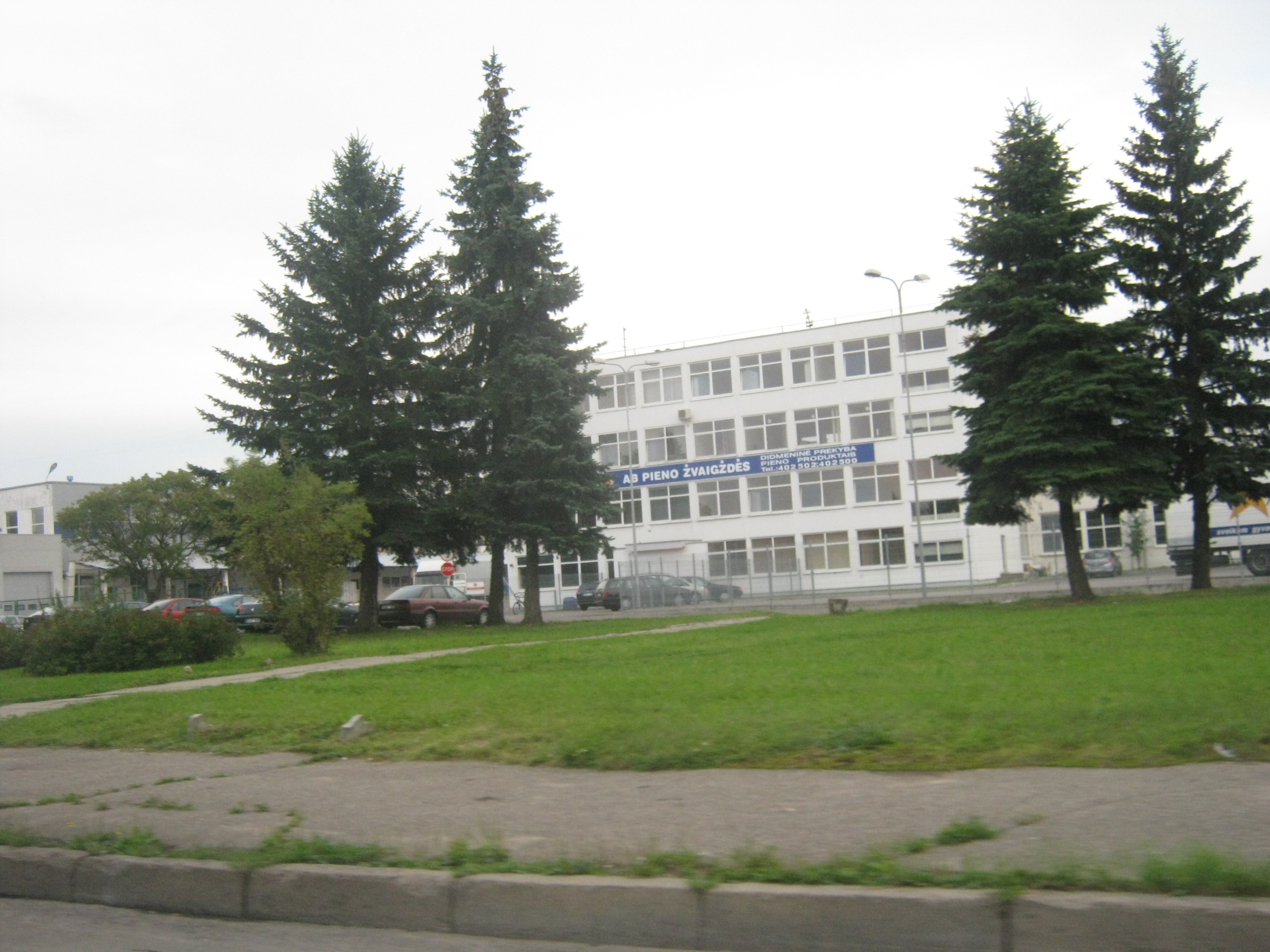 AB Pieno žvaigždės